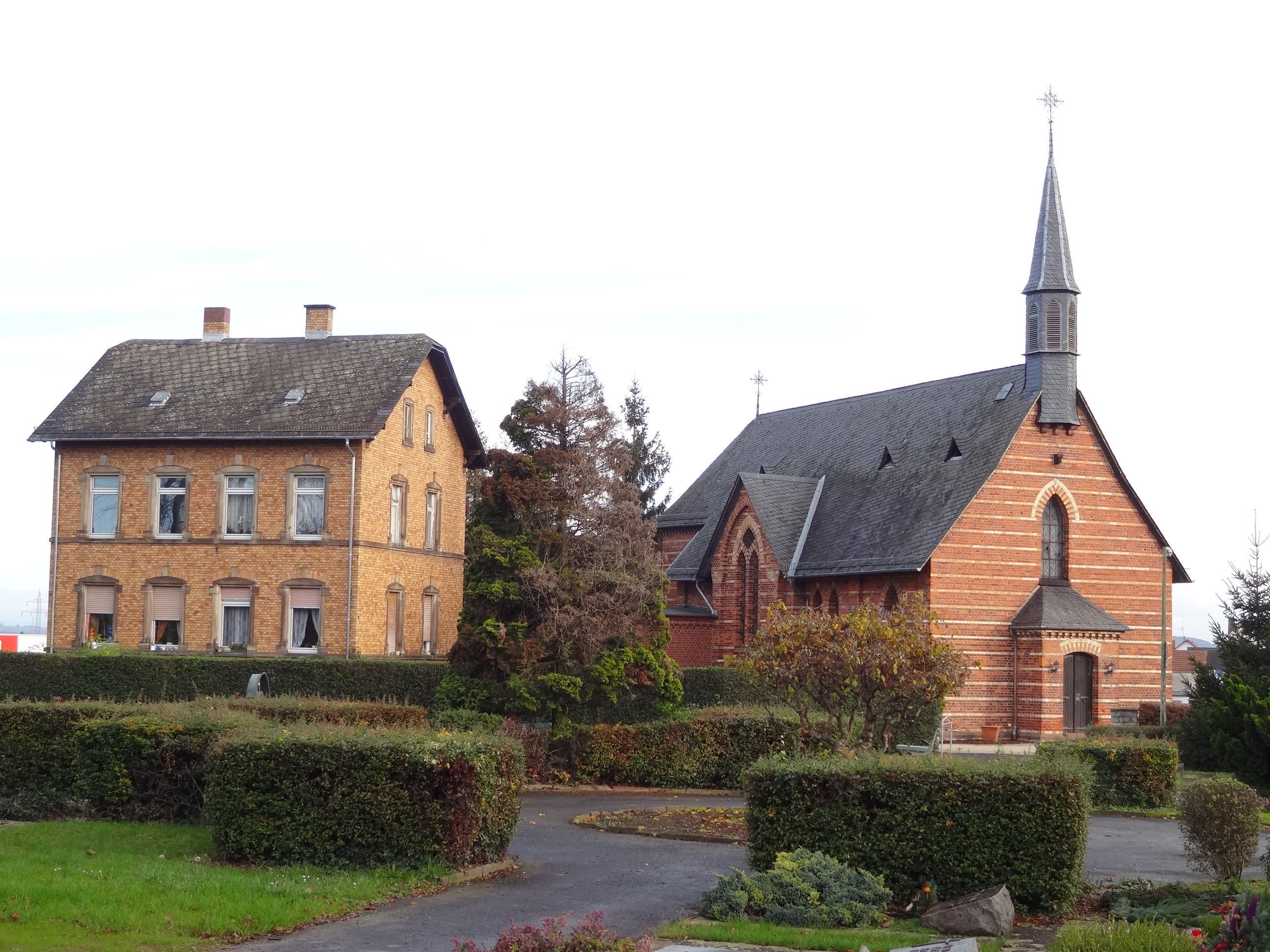 Griedeler Straße 52 (Butzbach)